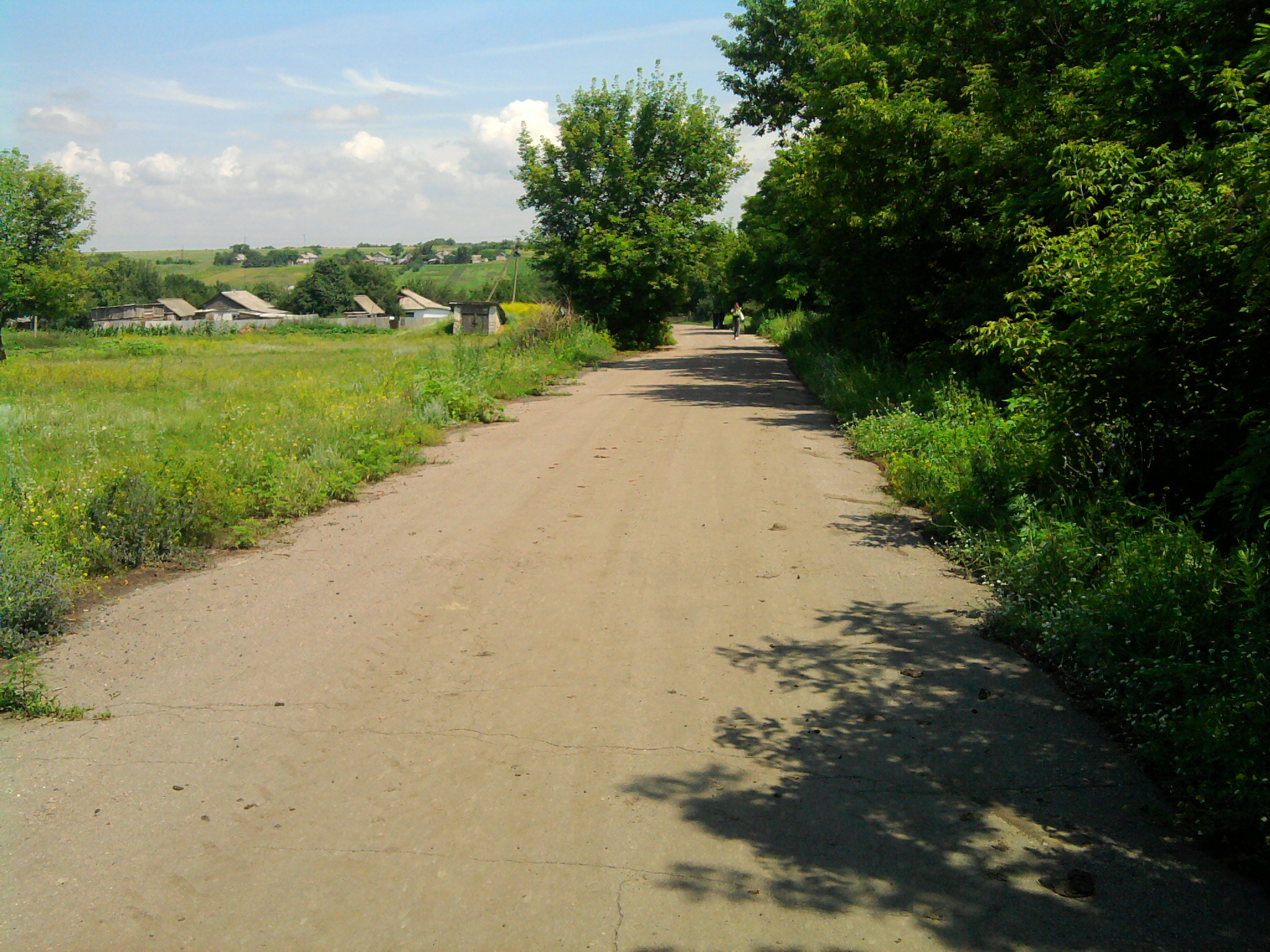 Село Зелёное